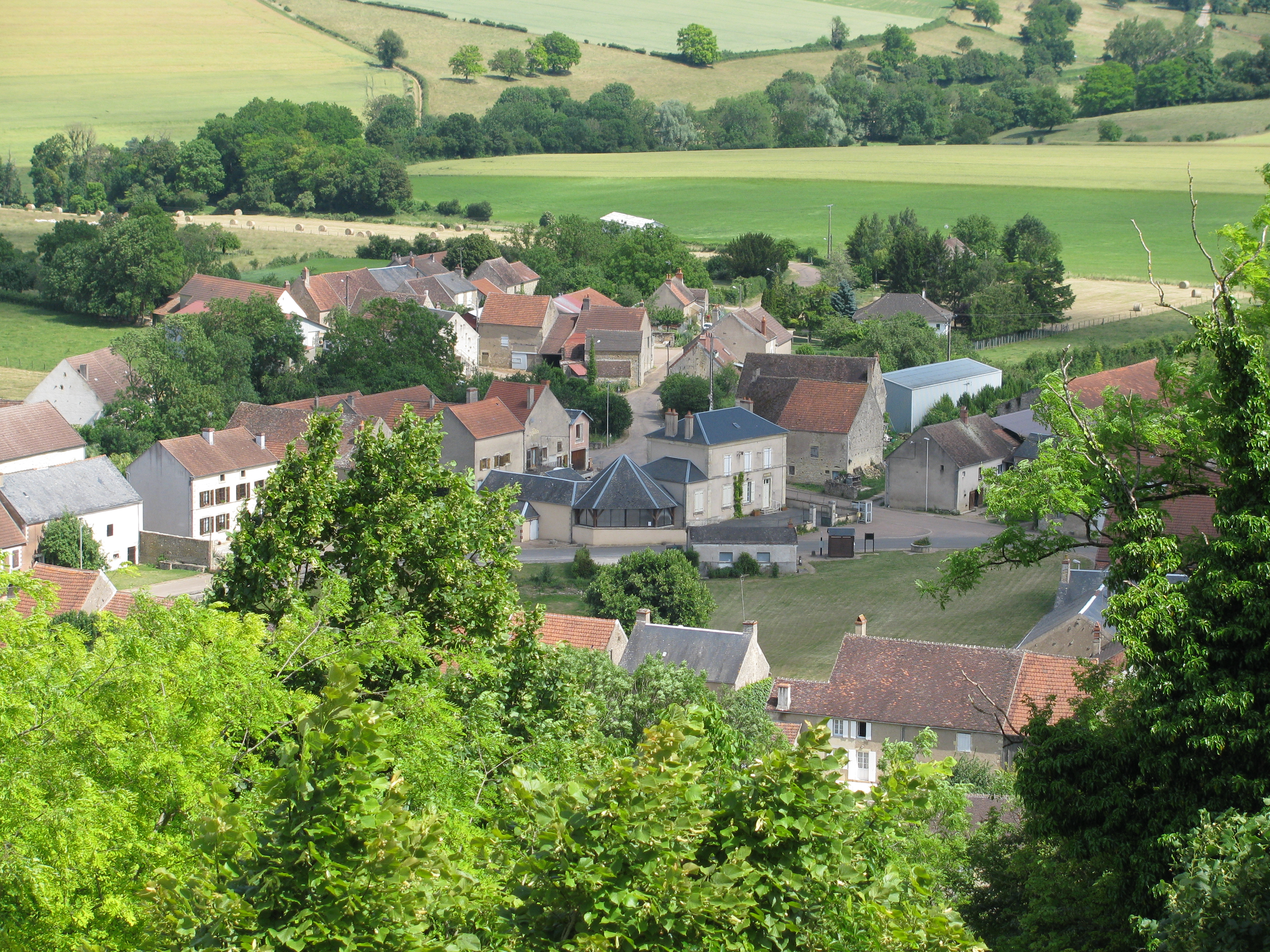 Le village de Metz-le-Comte, depuis Notre-Dame de l'Assomption. Nièvre, France.